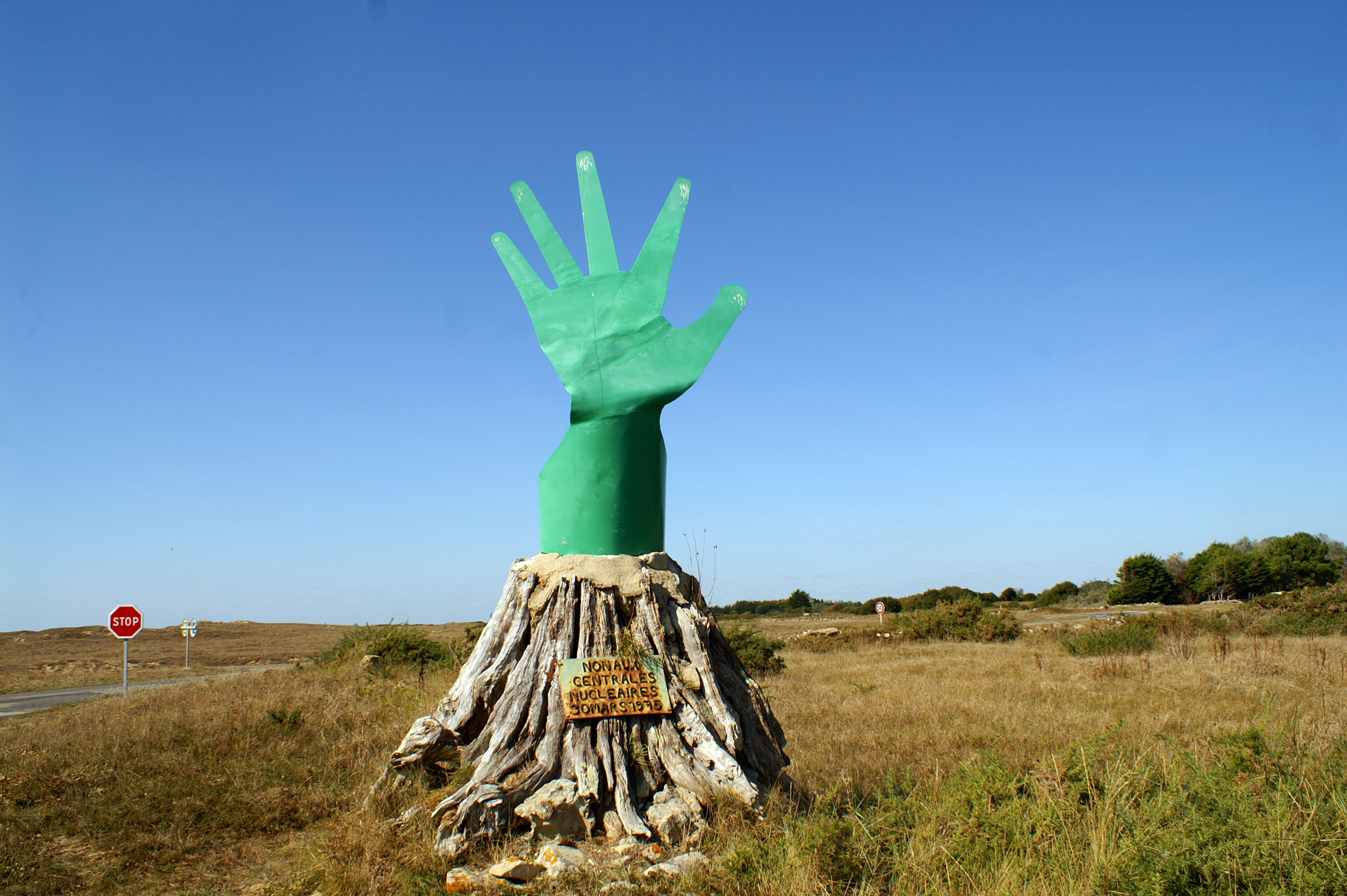 Monument de la Main Verte en souvenir de la lutte contre les centrales nucléaires, manifestation du 30 mars 1975.